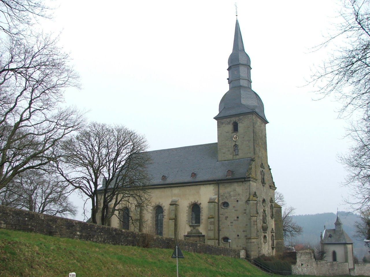 Pfarrkirche St. Margaretha in Sichtigvor/Deutschland